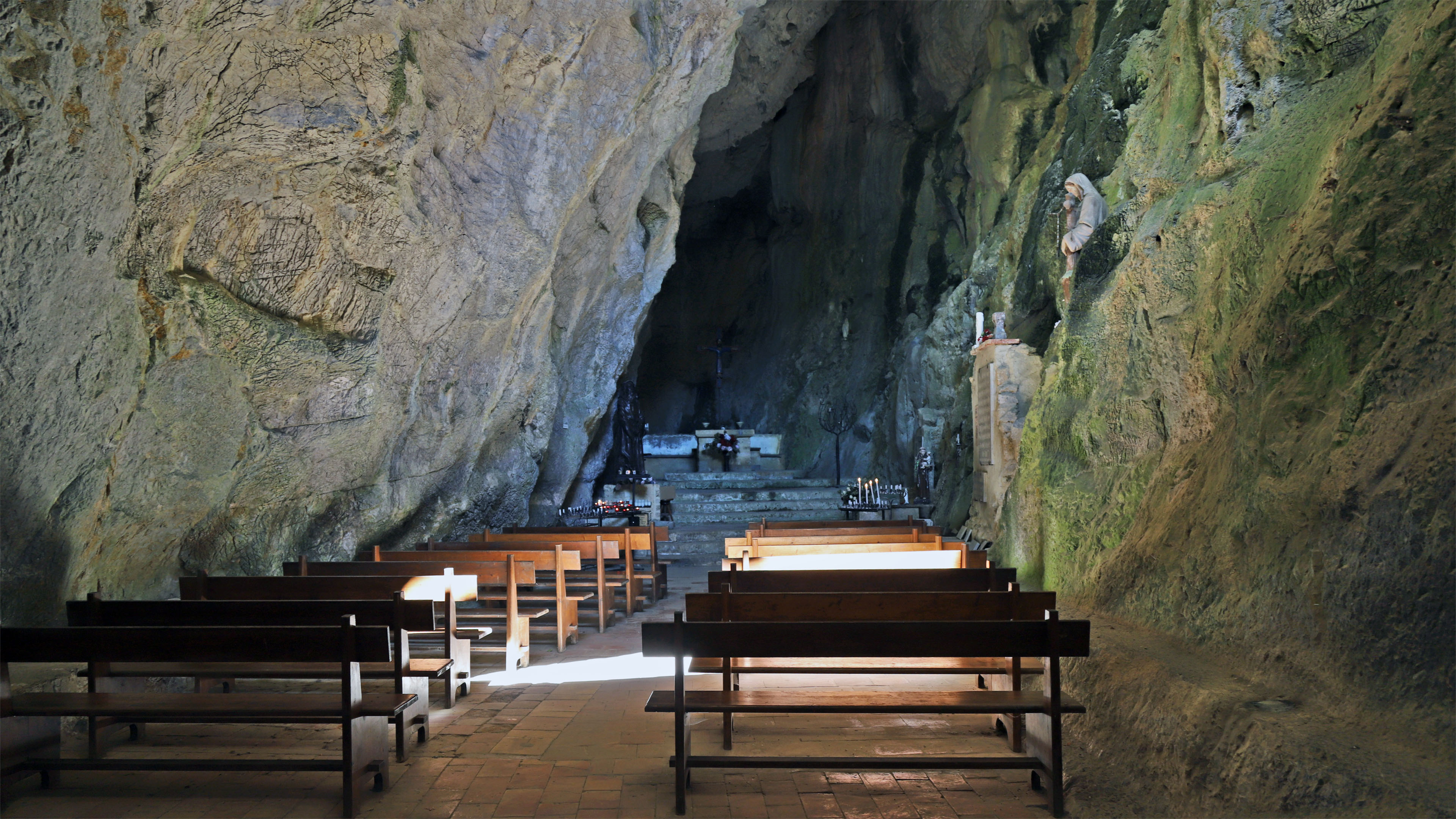 Intérieur chapelle